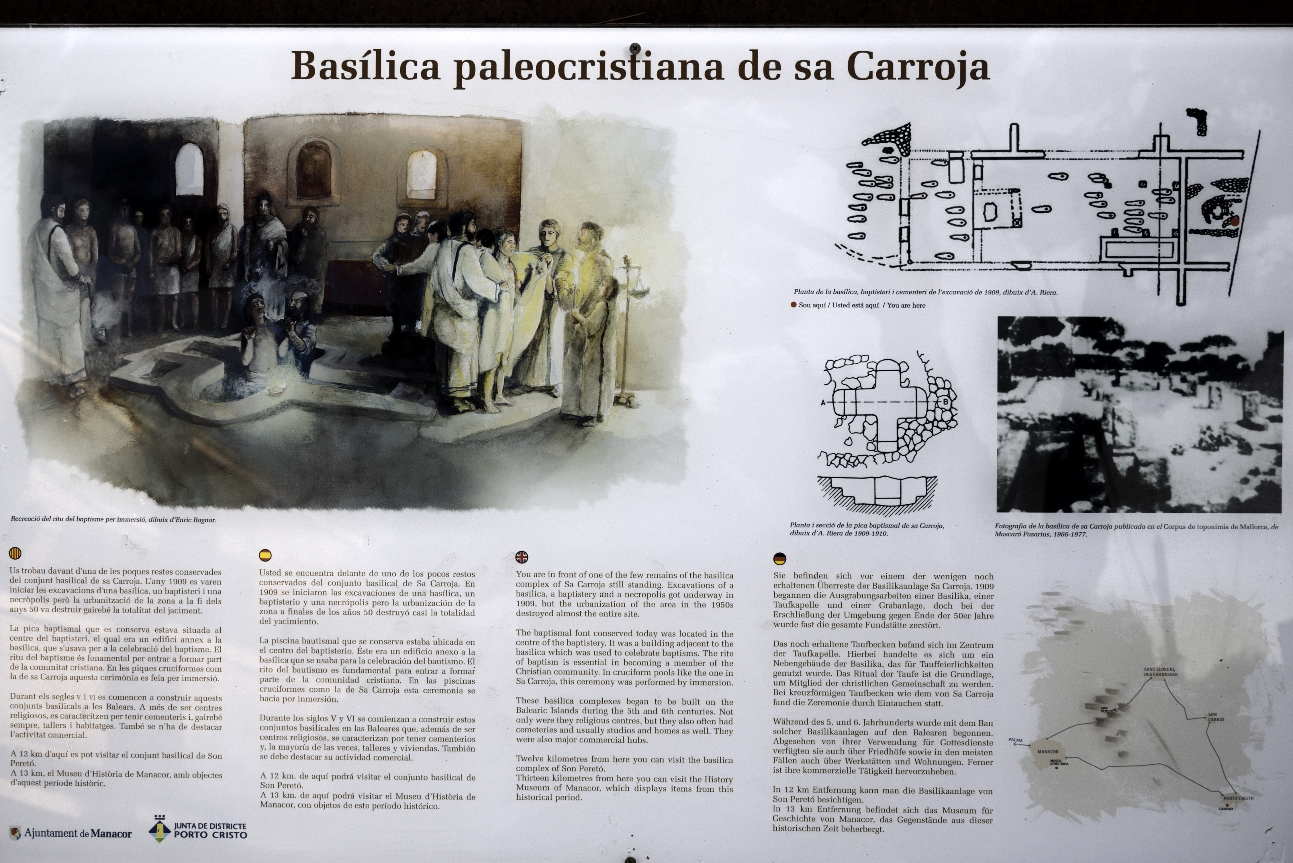 Cartell en català, espanyol, anglès i alemany